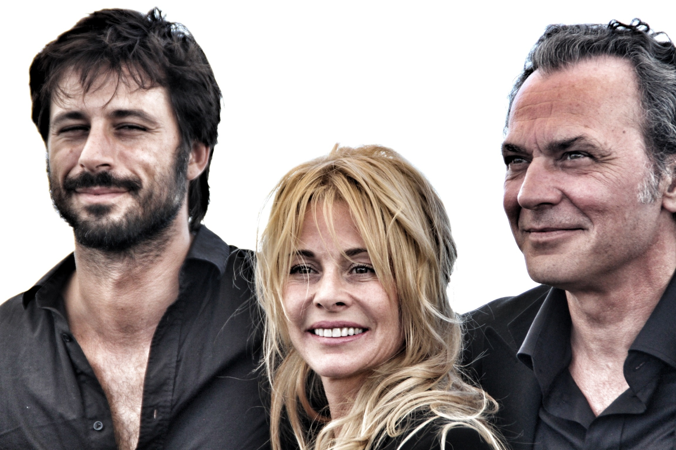 Los actores españoles Hugo Silva, Belén Rueda y José Coronado, en el Festival de Sitges 2012.